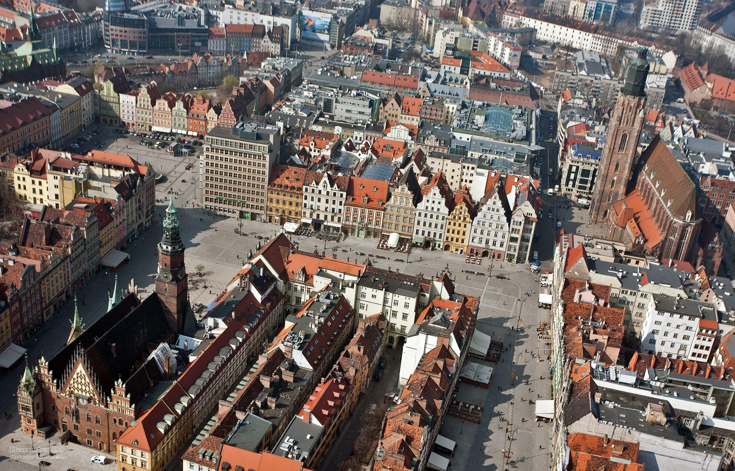 Foto-loto nad wrocławskim rynkiem. Ładnie widoczna zachodnia pierzeja i u góry, z lewej, pl. Solny.